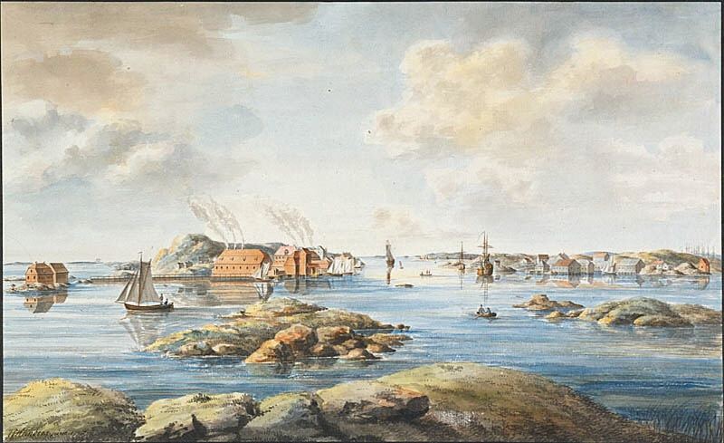 Trankokeri och sillsalteri i Bohuslän, målning med penna och svart bläck, akvarell, på papper. Skapad av Justus Fredrik Weinberg och signerad 1795.